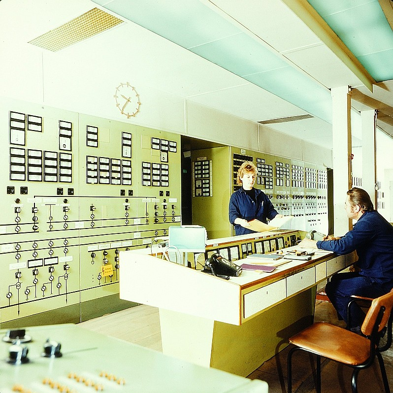 Original image description from the Deutsche Fotothek Maschinist für Wärmekraftwerke